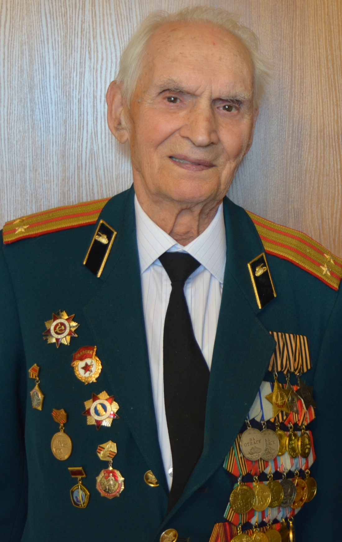 Полный кавалер ордена Славы Александр Гаврилович Когутенко 2015 год.